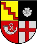 neues Wappen Beilstein (Mosel), Quelle